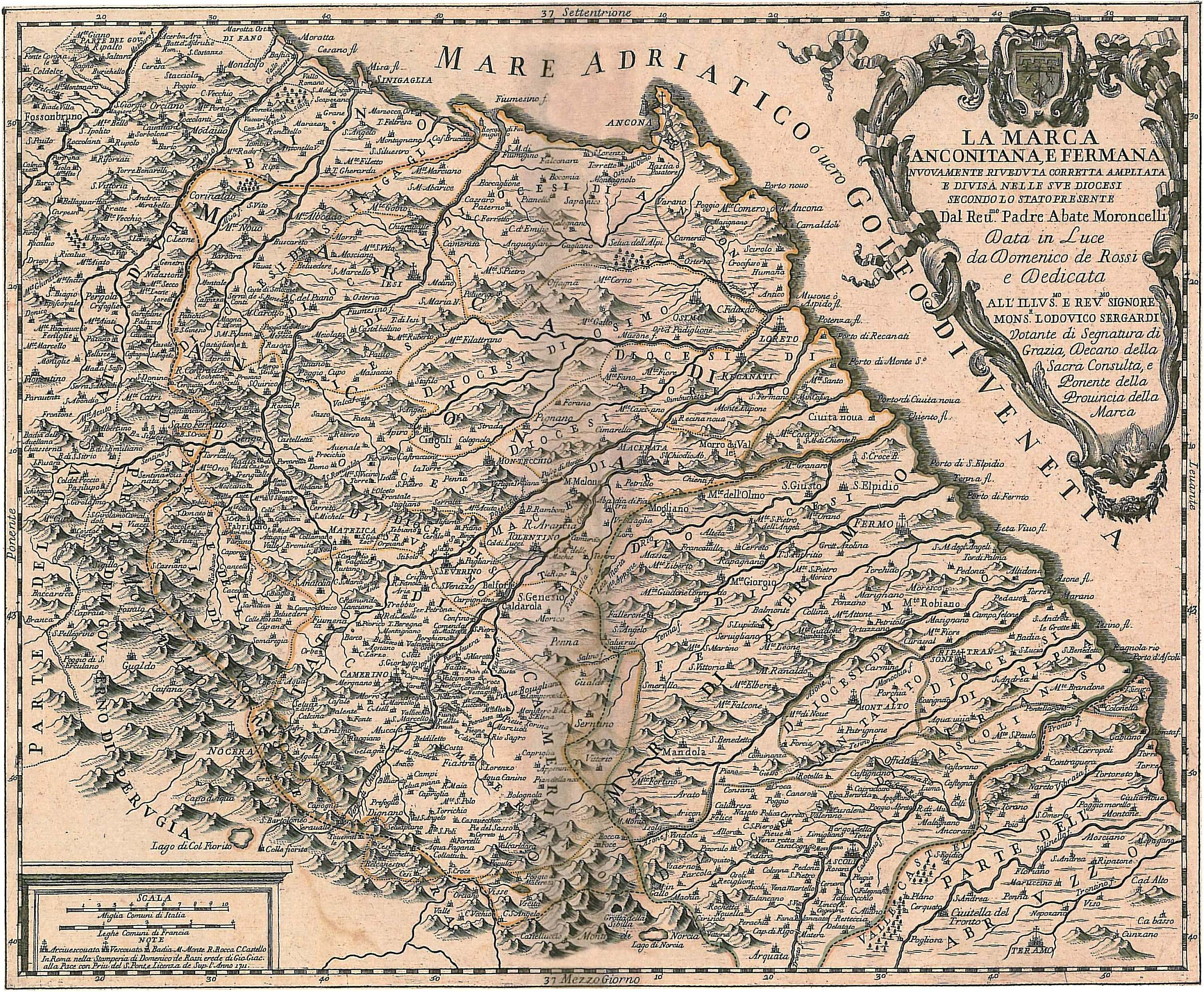 La Marca Anconitana E Fermana, 1699-1703, Silvestro Amanzio Moroncelli (Cartoteca storica delle Marche)